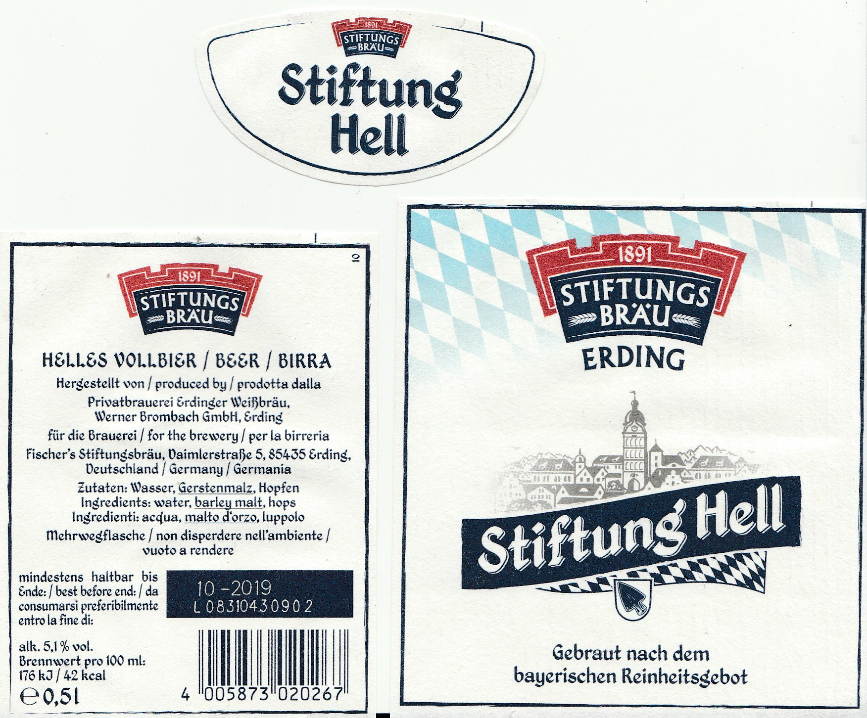 Ein Etikett des Fischer's Stiftungsbräu, Stiftung Hell, im Uhrzeigersinn: Hals, Vorderseite, Rückseite, von 2019.